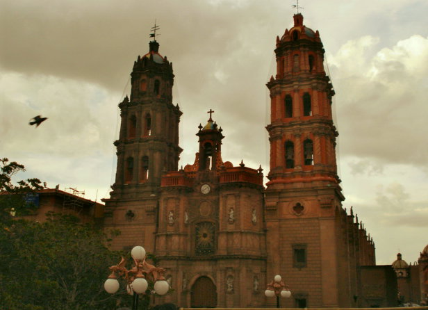 Catedral de la ciudad de San Luis Potosí